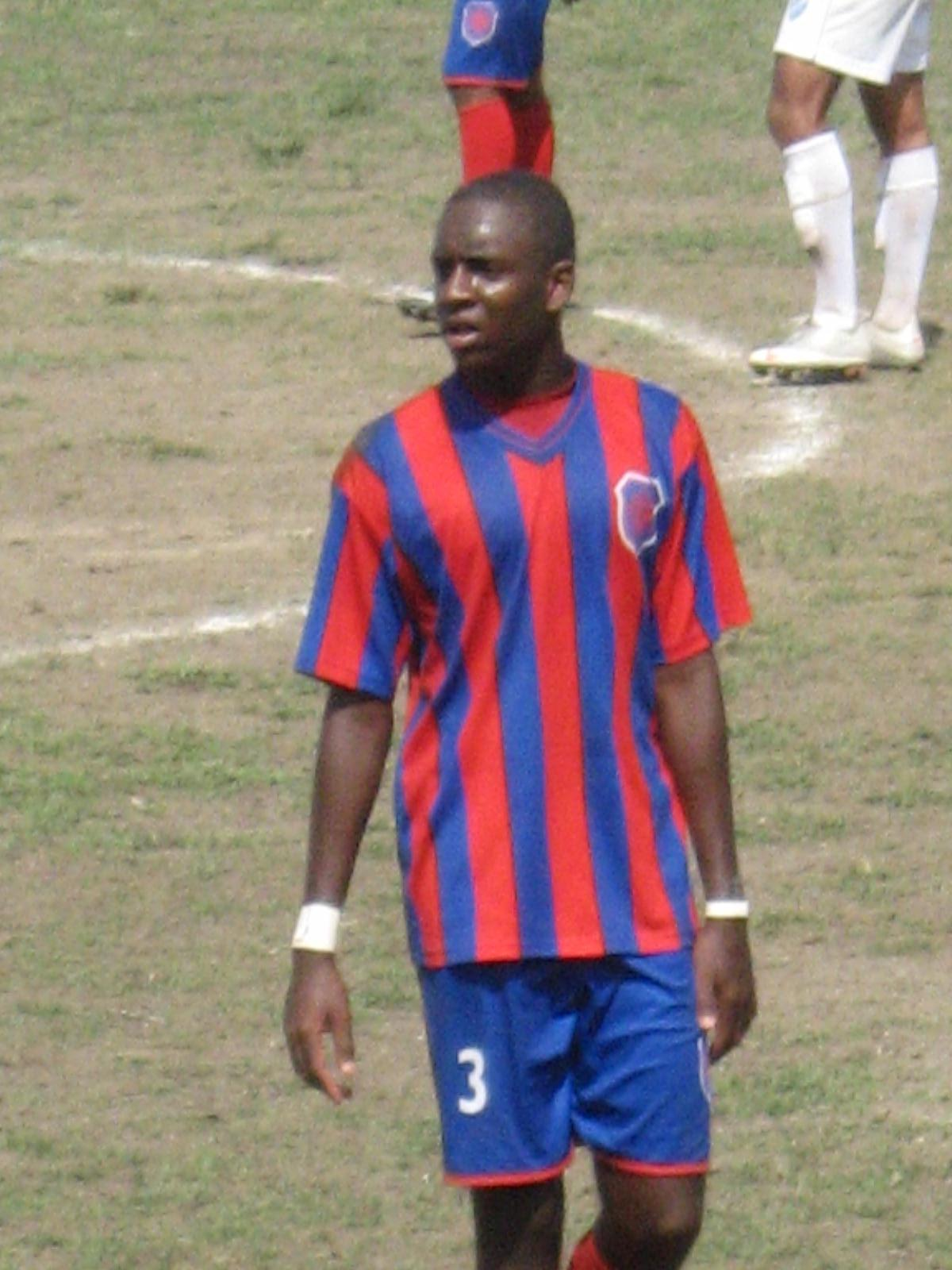 Modelo de uniforme do Bonsucesso Futebol Clube